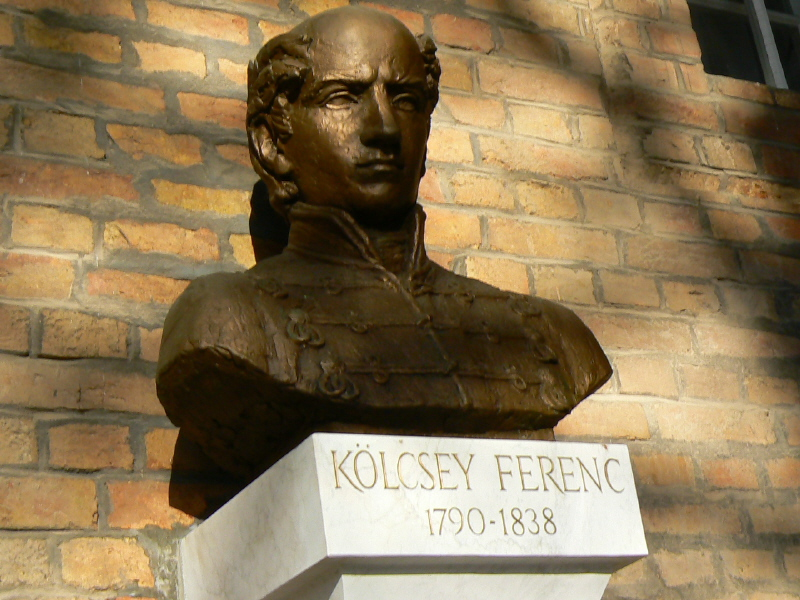 Fűz Veronika szobrász Kölcsey Ferenc - a Himnusz költőjének - bronz mellszobra, 2001. január 21.